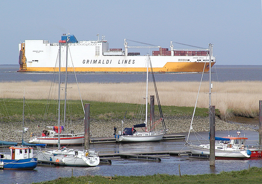 Der Hafen bei Ebbe mit Grande Africa, er verschlickt zusehends IMO Number: 9130949 MMSI Number: 266275000 Callsign: SKFG Length: 214 m Beam: 32 m